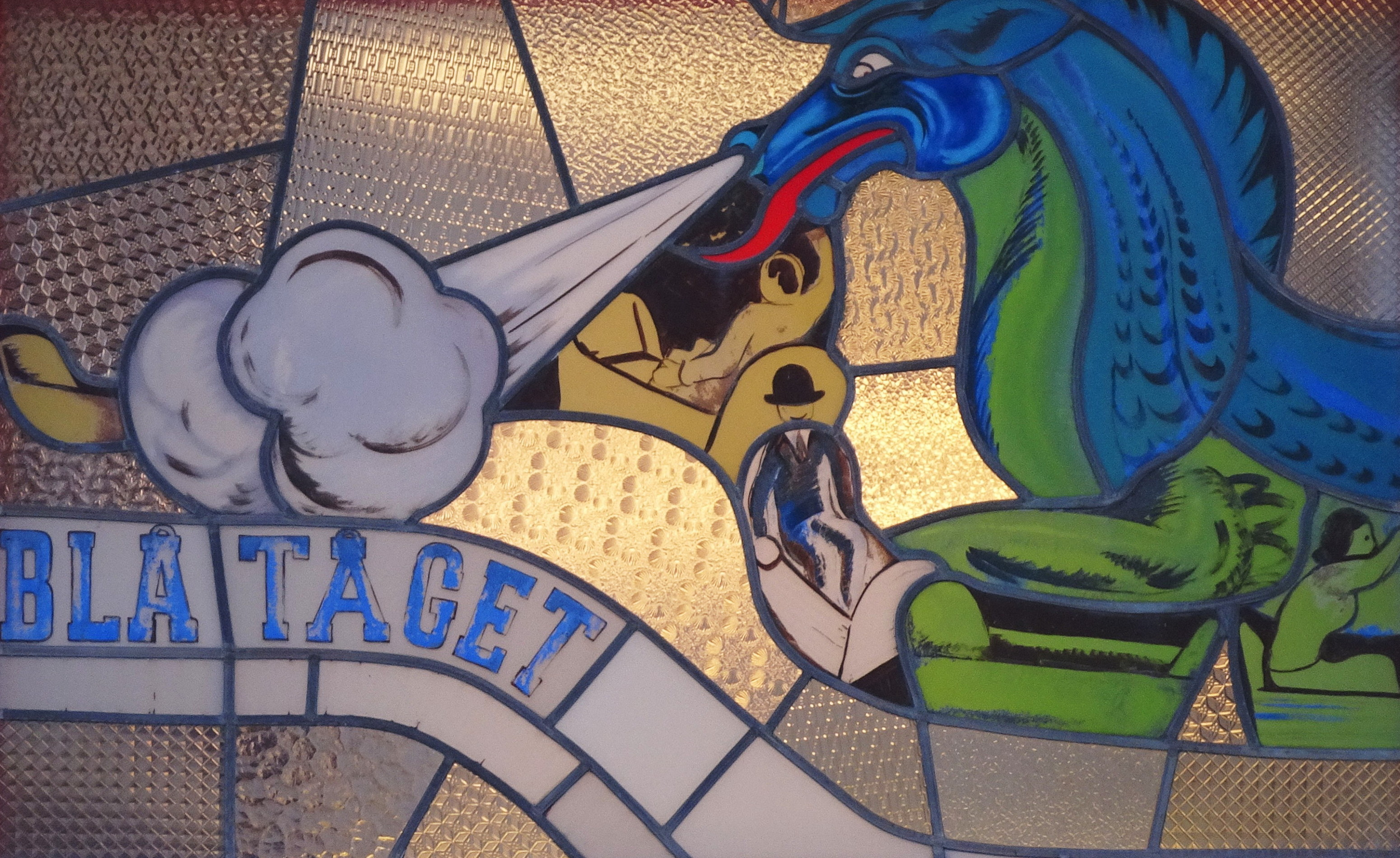 Armand Rossanders glaskonst med motiv från Gröna Lund